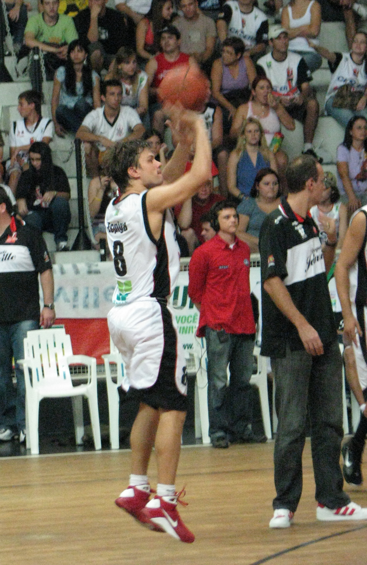 Espiga 3pt shot